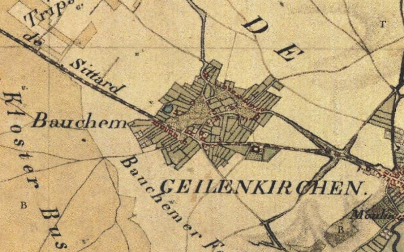 Kartenaufnahme der Rheinlande 1803-1820